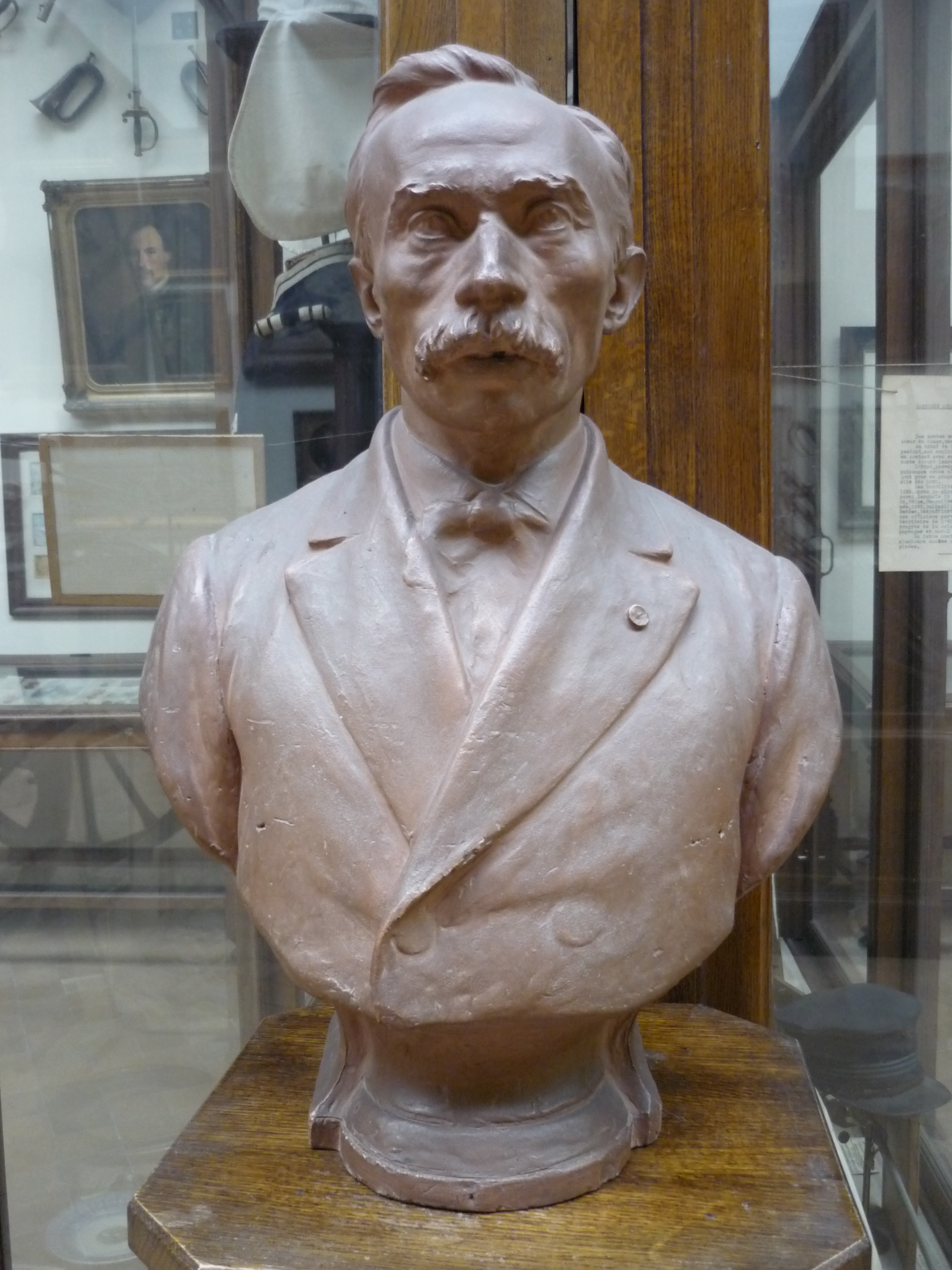 Buste d'Émile Banning, Musée royal de l'Armée, Bruxelles, Belgique.